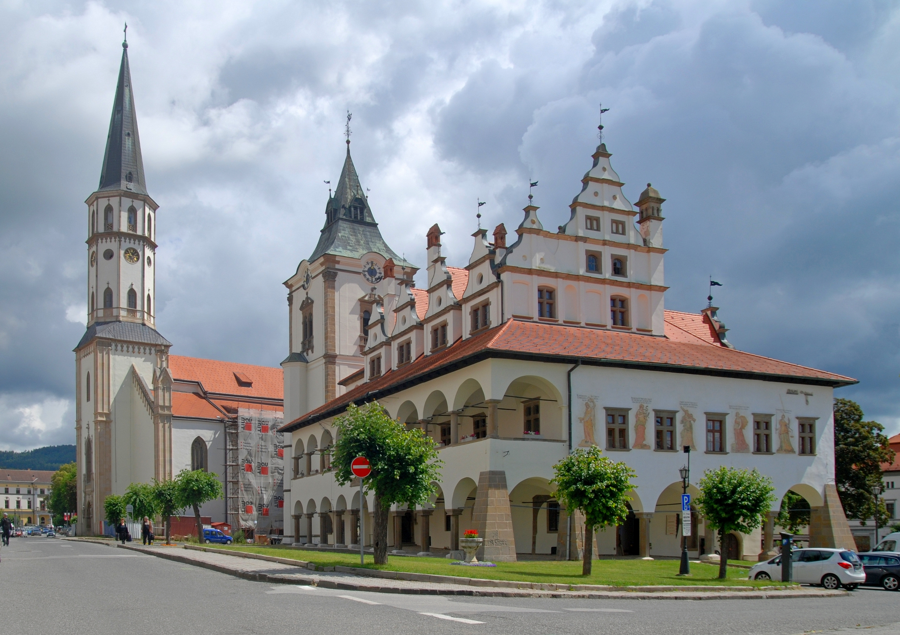 miasto Levoča